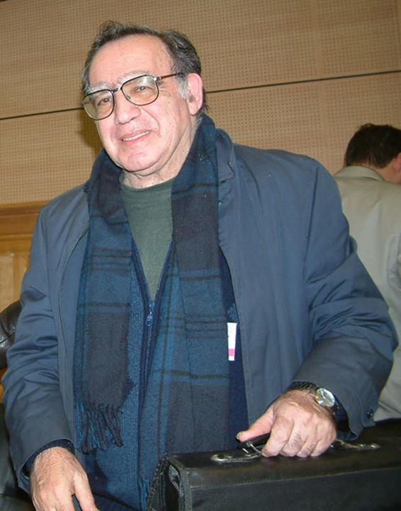 Mohamed Guessous